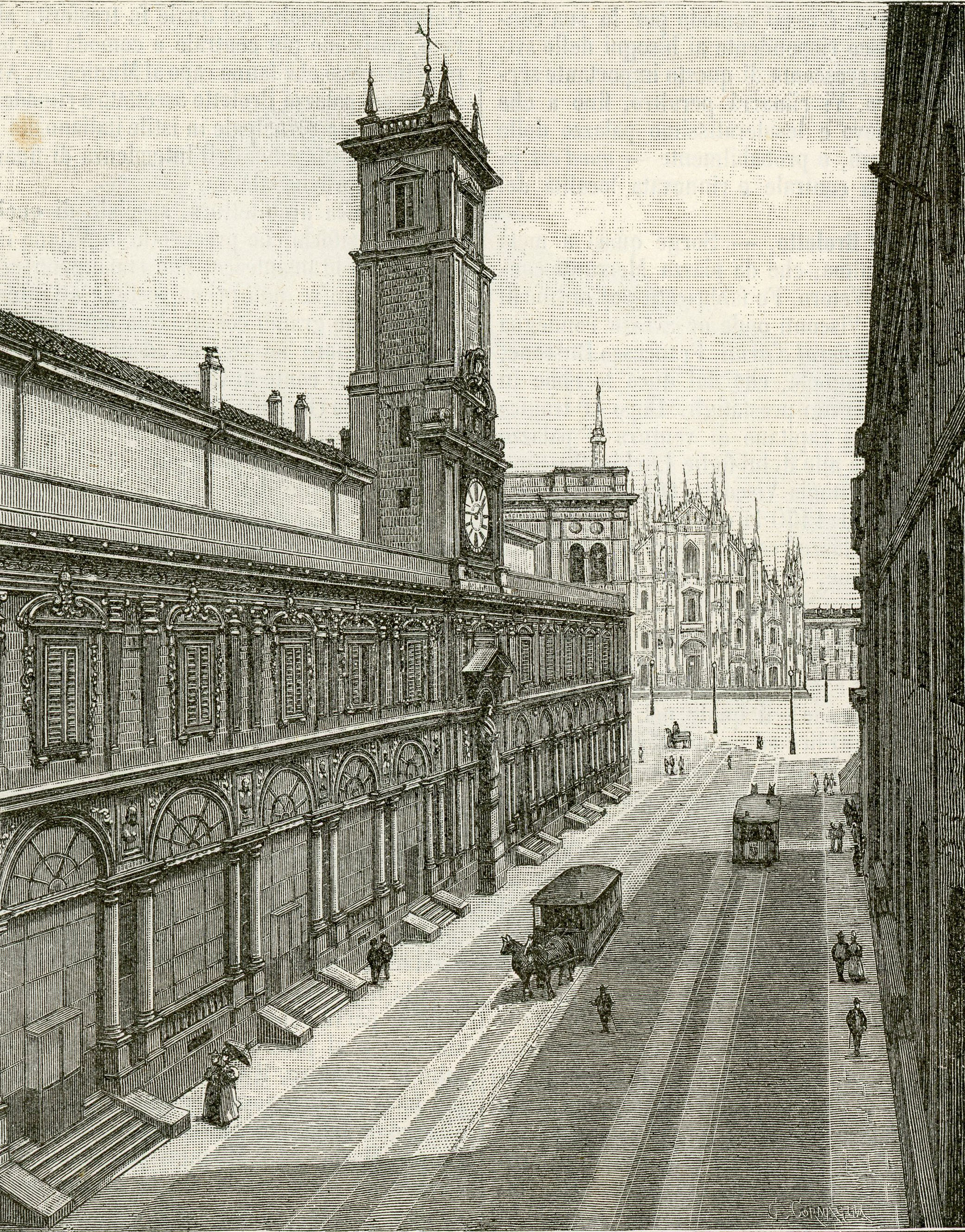 Milano: Palazzo dei Giureconsulti (xilografia di Carlo Cornaglia).